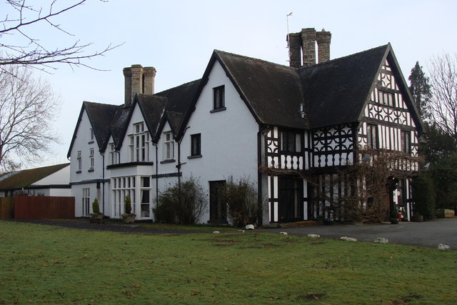 Maesmawr Hall hotel, Powys, Wales